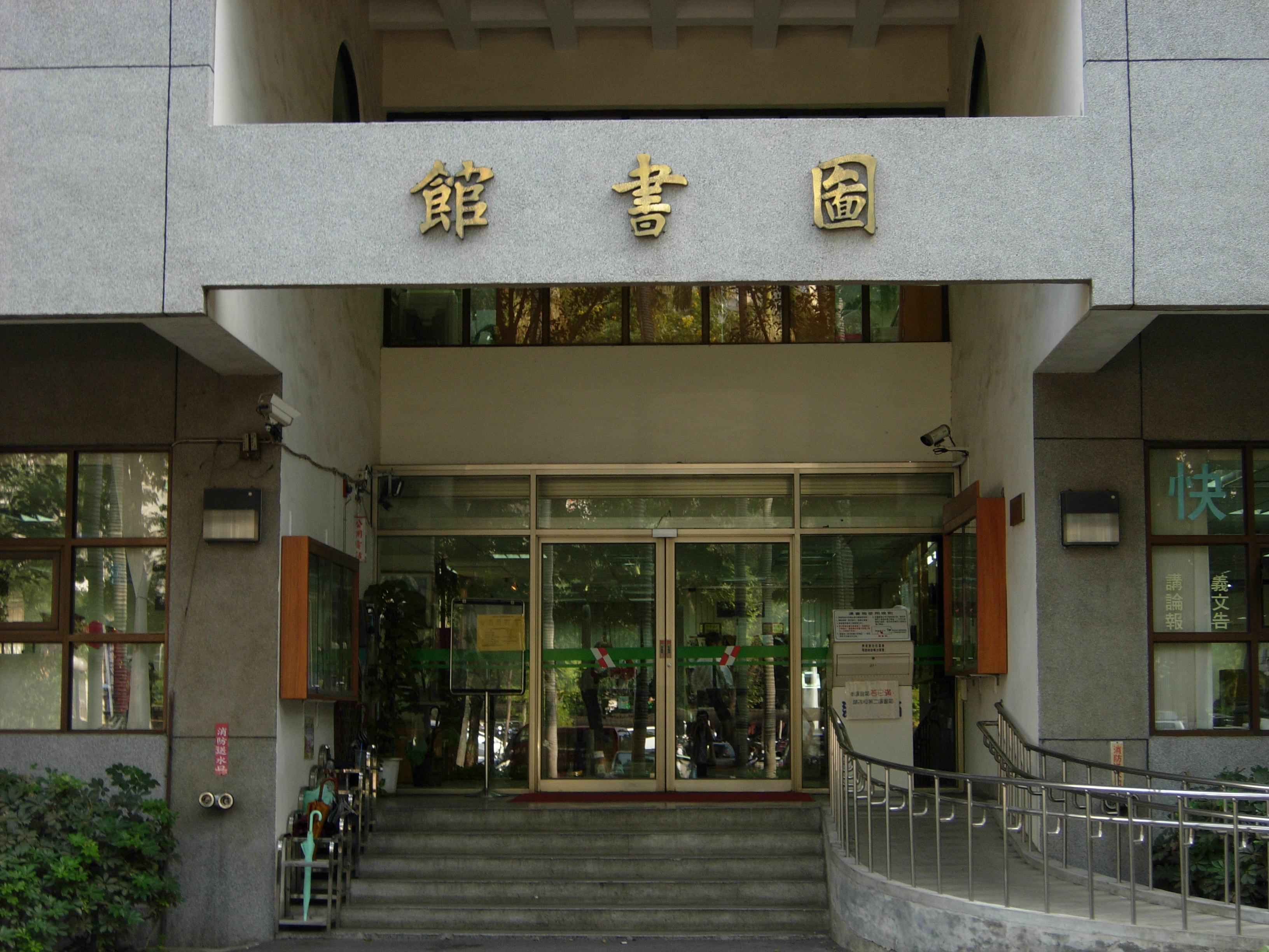 国立新竹教育大学图书馆